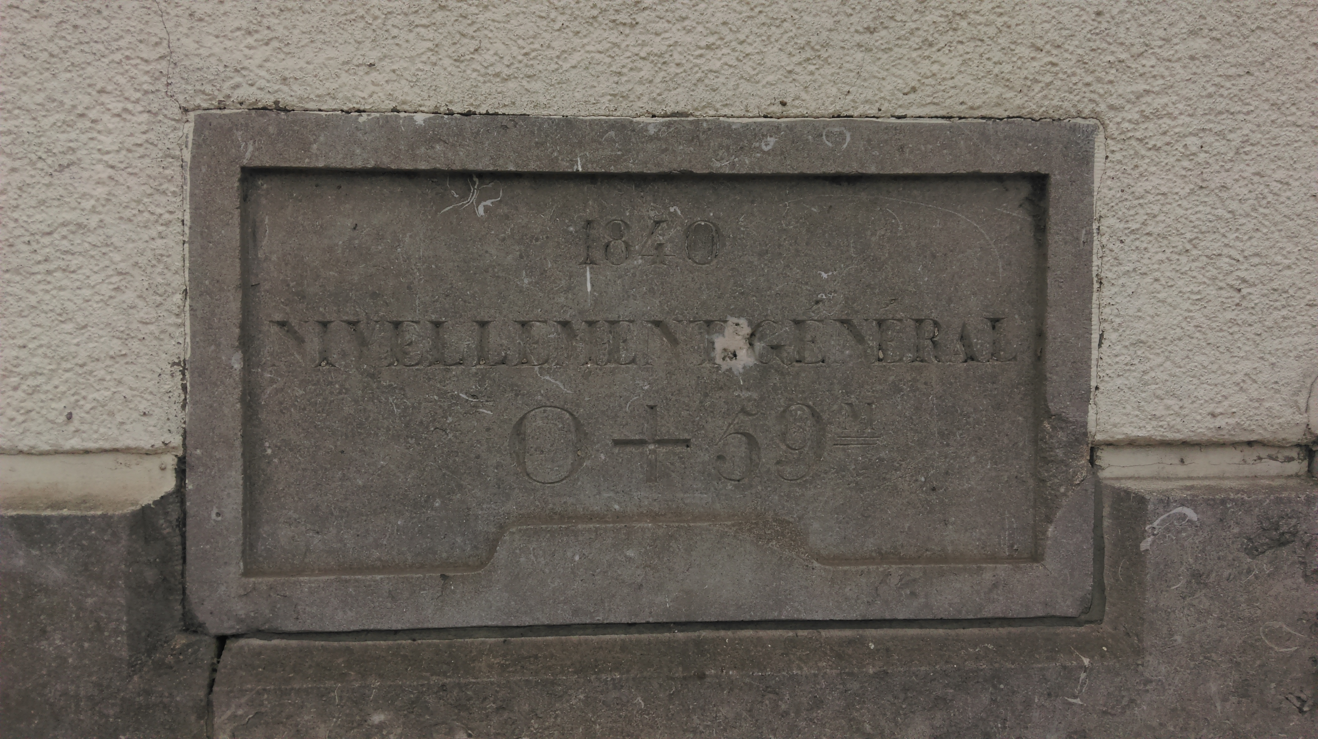 Steen in de voorgevel van het station van Tienen met aanduiding hoogte boven zeespiegel en met jaartal 1840